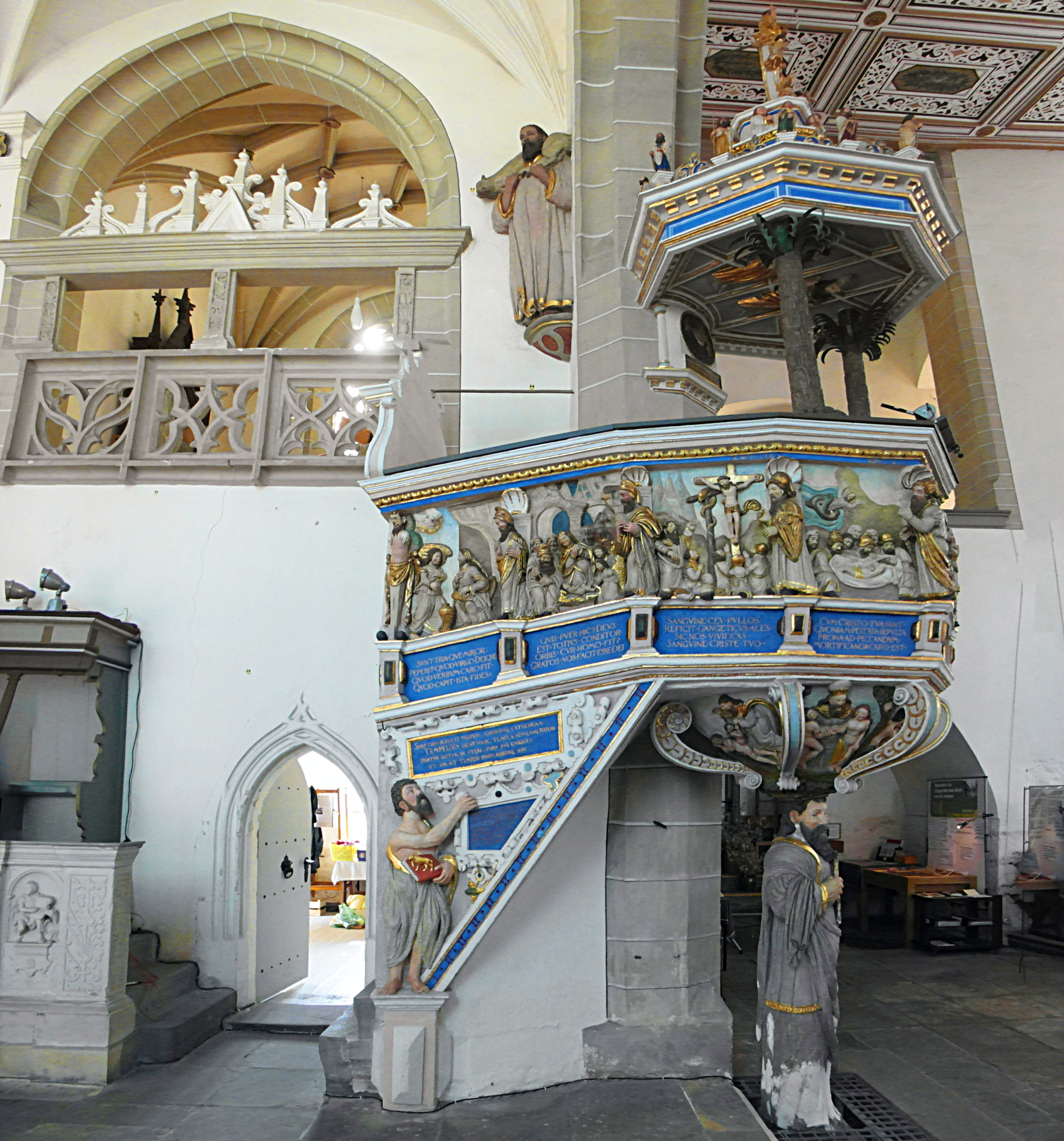 die Kanzel aus dem Jahre 1608 ist aus Gipsstuck